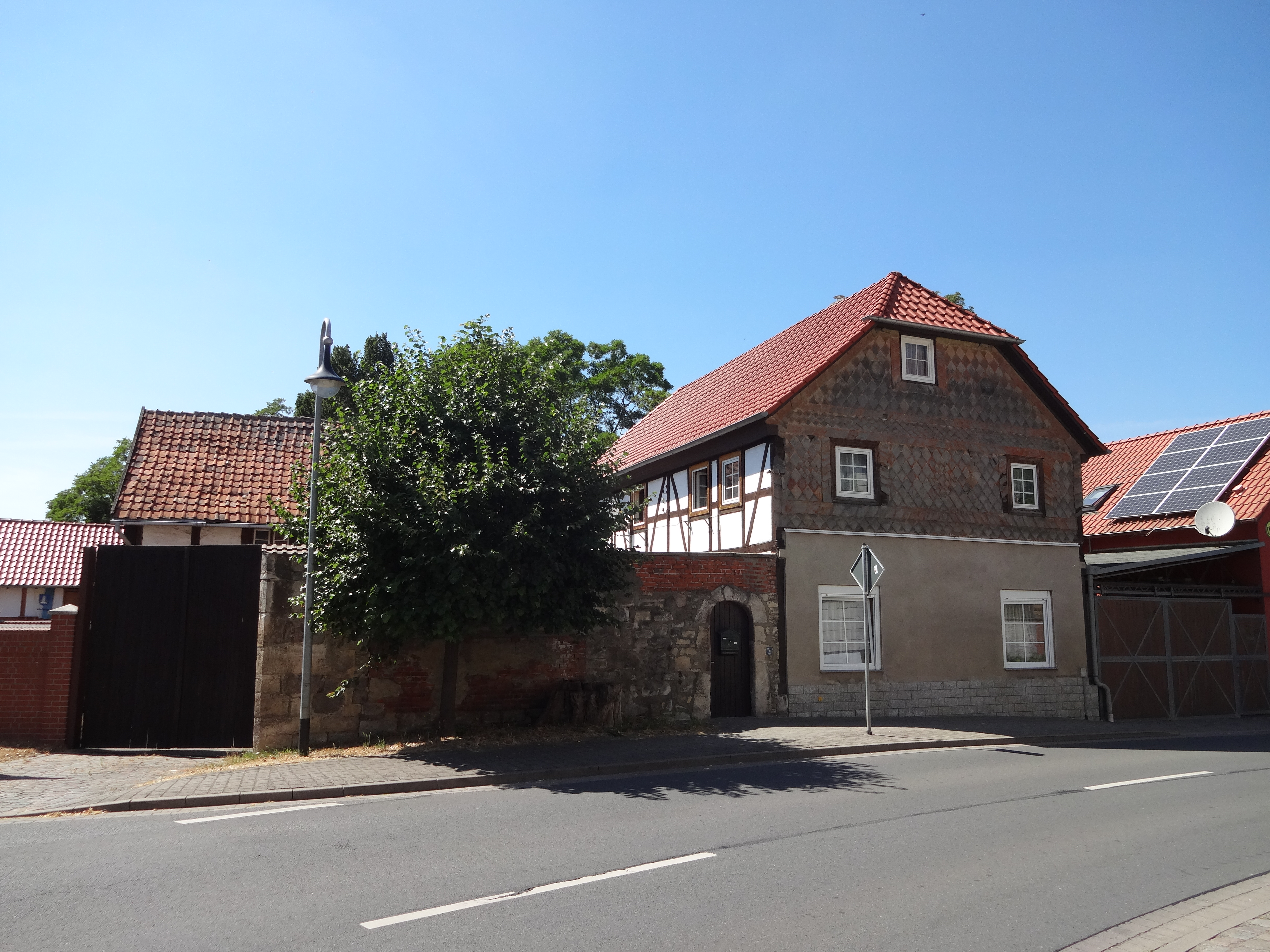 denkmalgeschützter Bauernhof in der Ernst-Thälmann-Straße 58 in Dedeleben